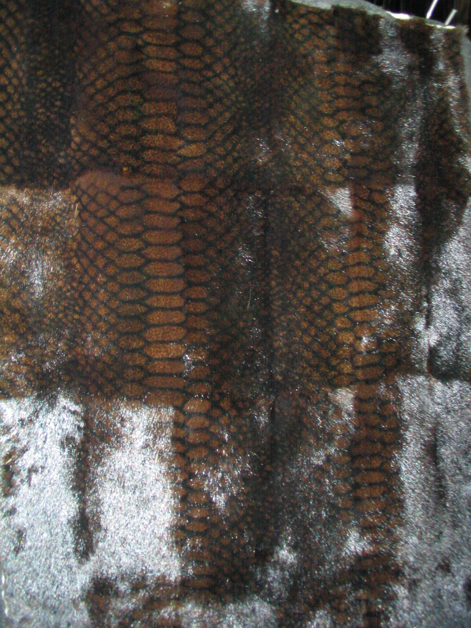 Pine squirrel Felltafeln, gefärbt und bedruckt